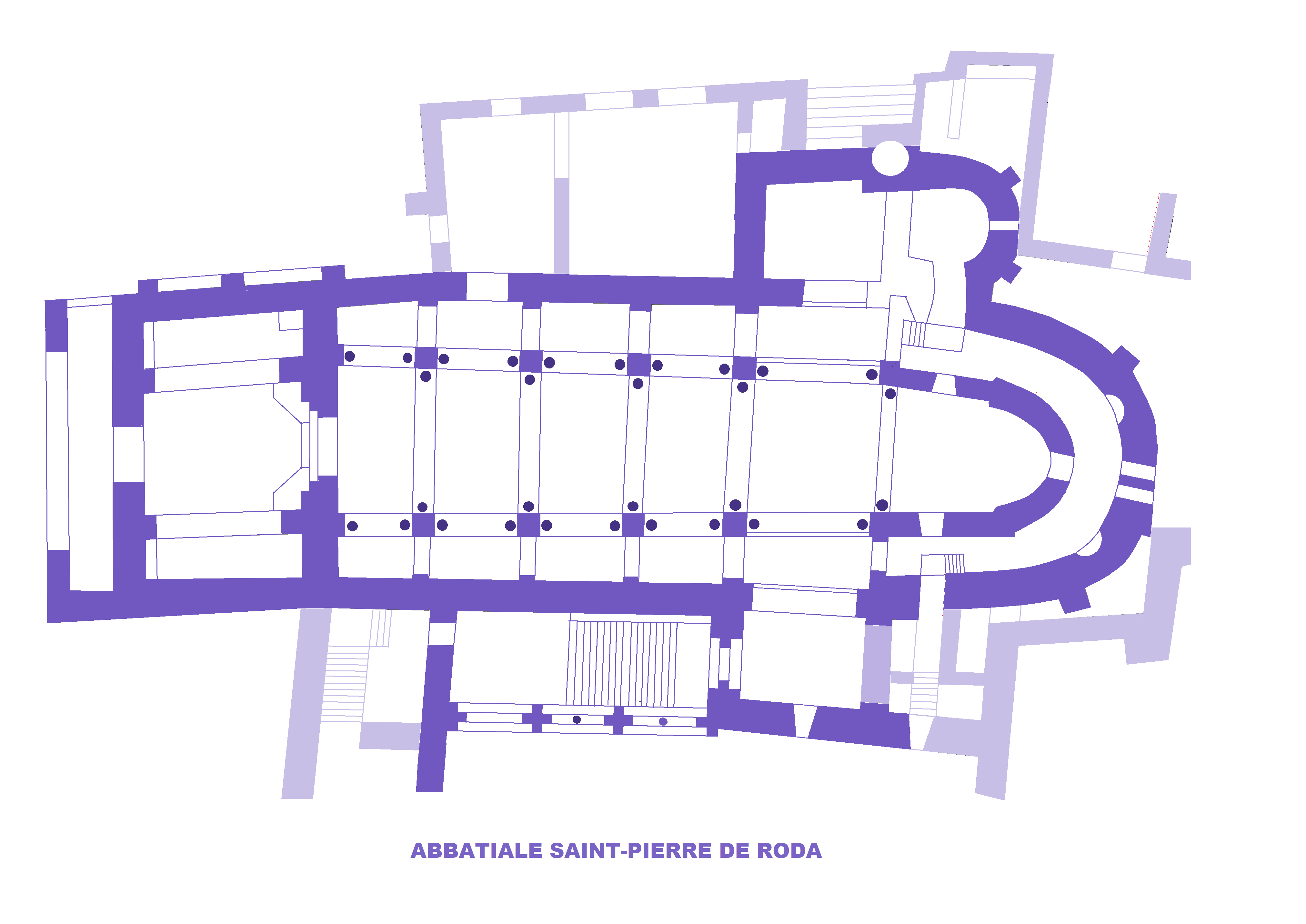 Abbatiale Saint-Pierre de Roda, Plan